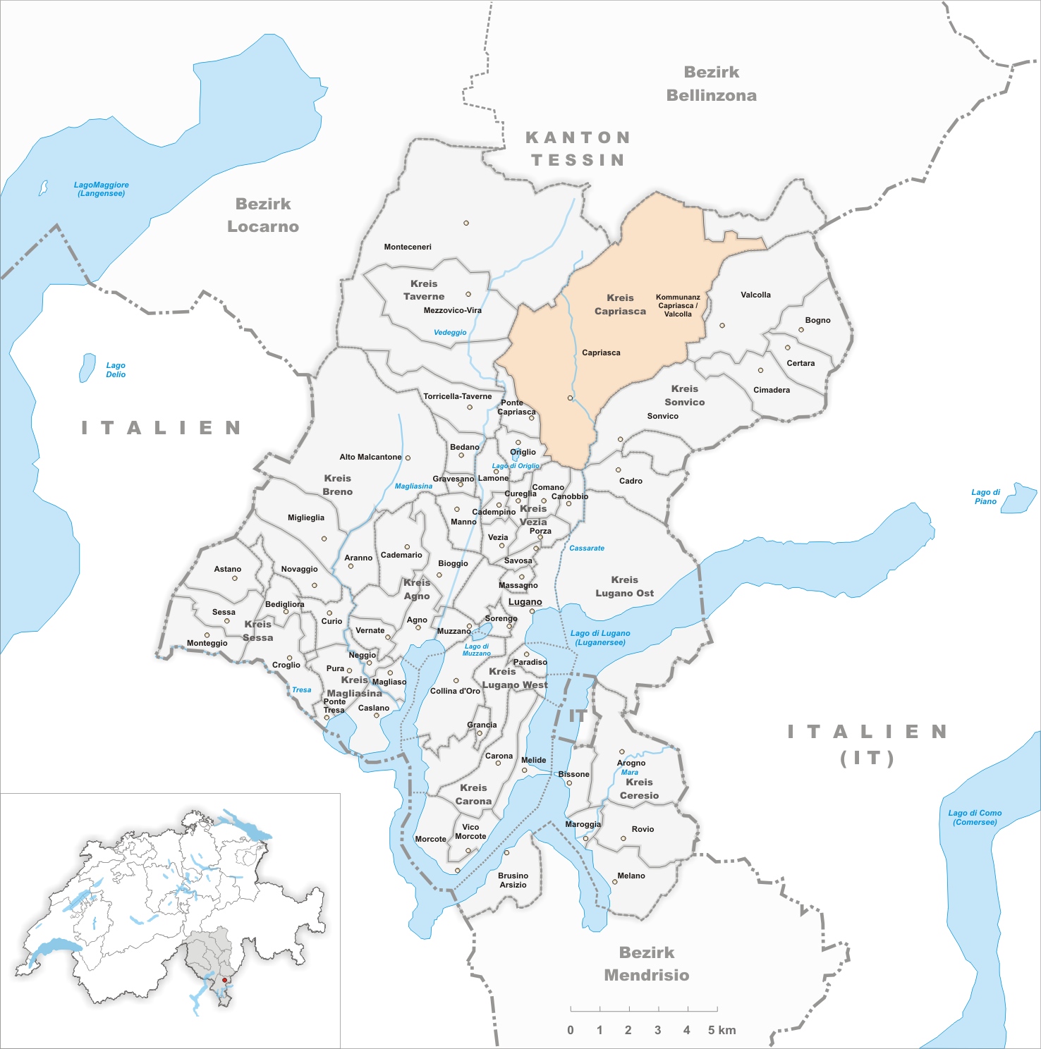 Municipality Capriasca